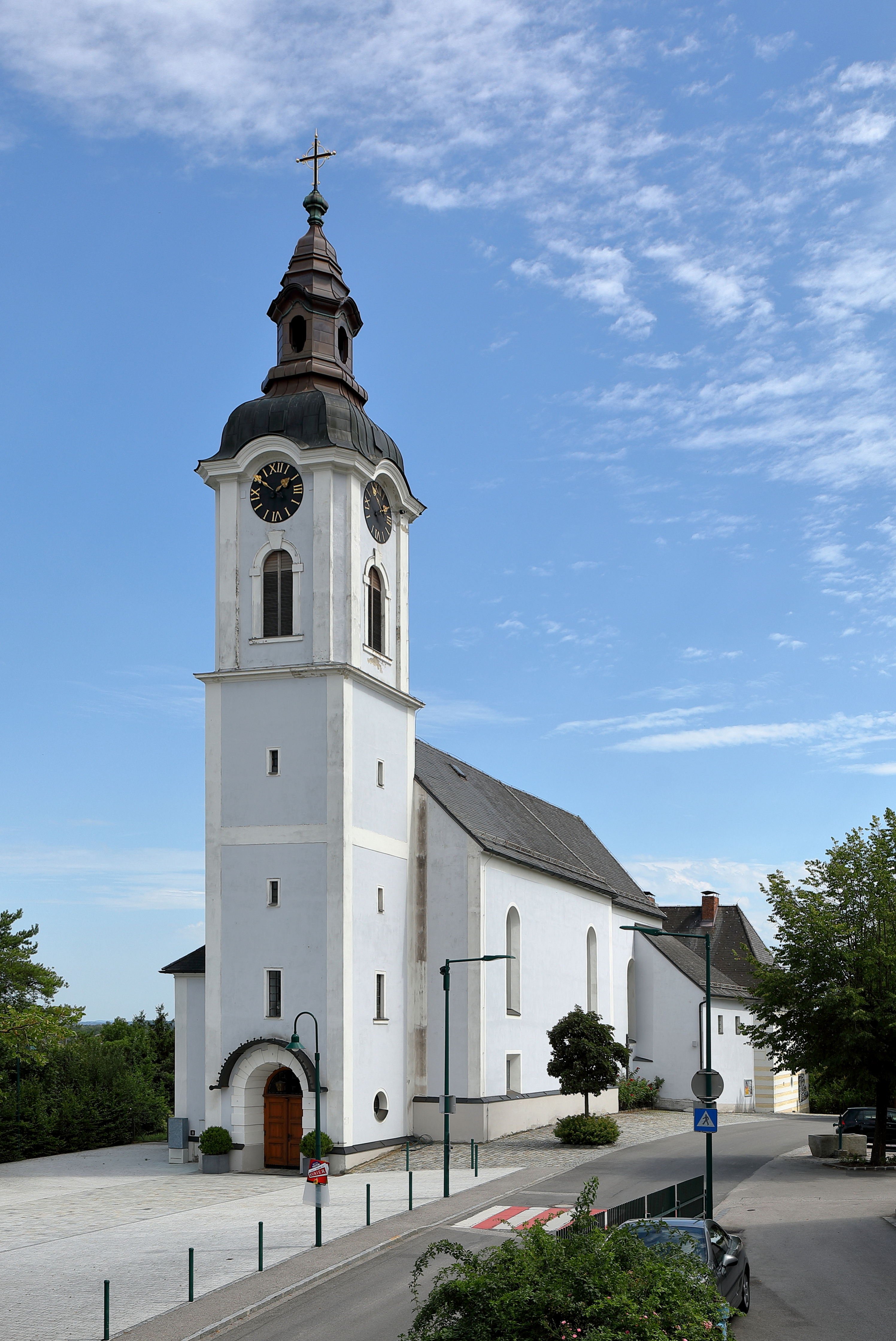 Westansicht der röm.-kath. Pfarrkirche hl. Wolfgang in Öhling, ein Ortsteil der niederösterreichischen Marktgemeinde Oed-Oehling.Eine schlichte im Kern barocke Saalkirche in erhöhter Lage. Nach einem Brand im Jahr 1816 war sie eine Brandruine und wurde 1833 wiedererrichtet. Der wuchtige neobarocke vorgestellte Westturm stammt aus dem Jahr 1914.